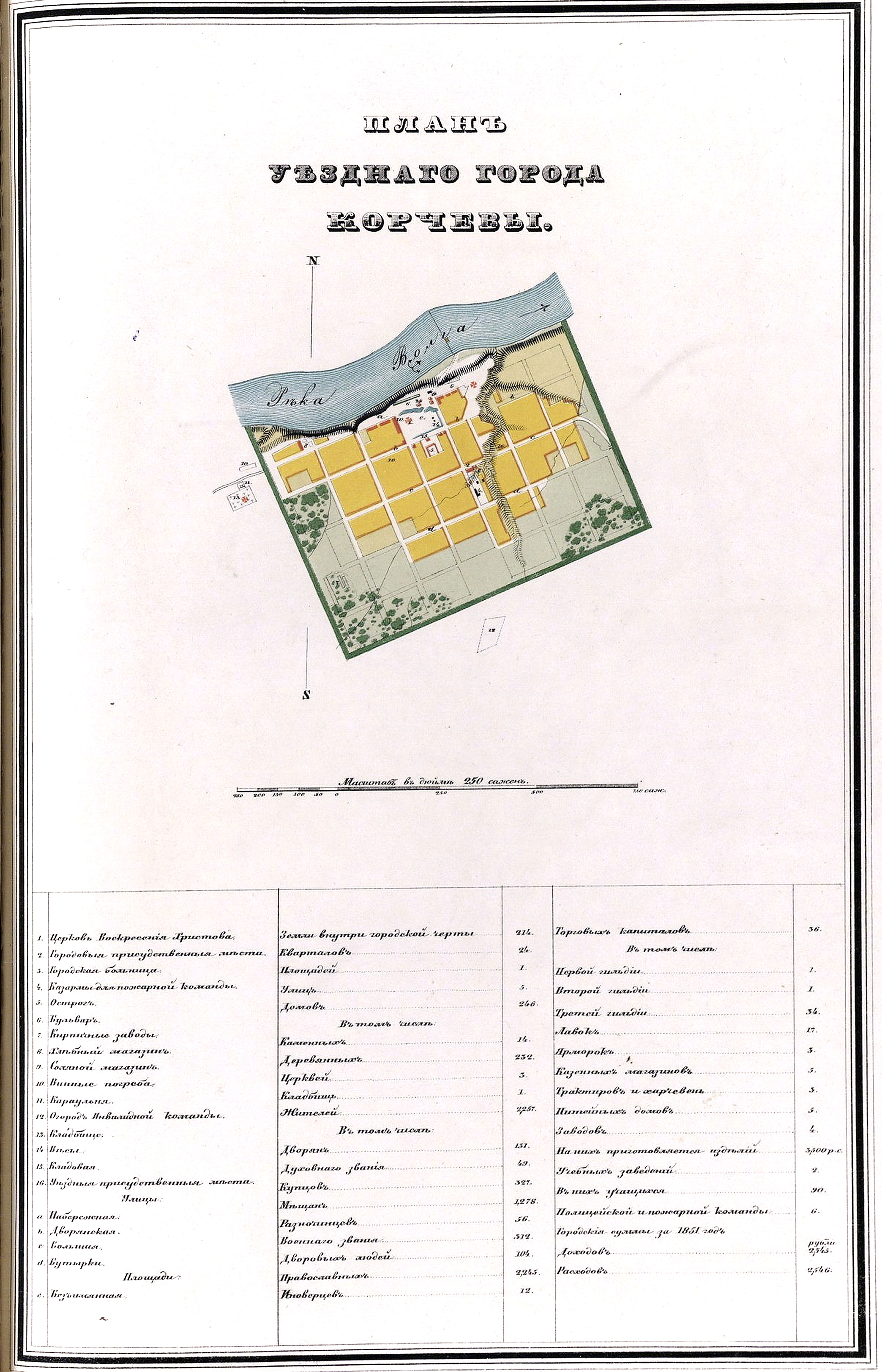 План уездного города Корчевы.